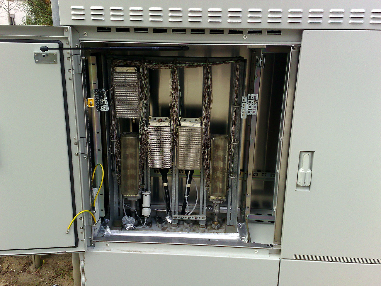 Kabelverzweiger in einem neuen VDSL2 DSLAM der T-Com (DSL-Anschlussstreifen nicht sichtbar)